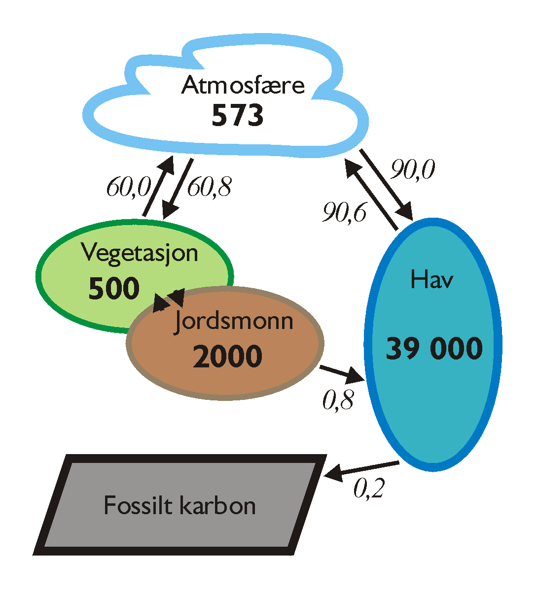 Karbonkretsløpet rundt år 1700 (dvs. før den industrielle revolusjonen) – tall angir mengder og flyt av karbon i gigatonn.